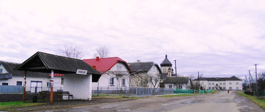 Вигляд села Завадів